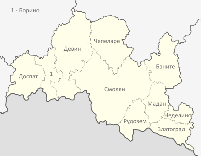 Картата е създадена от Любомир Таушанов